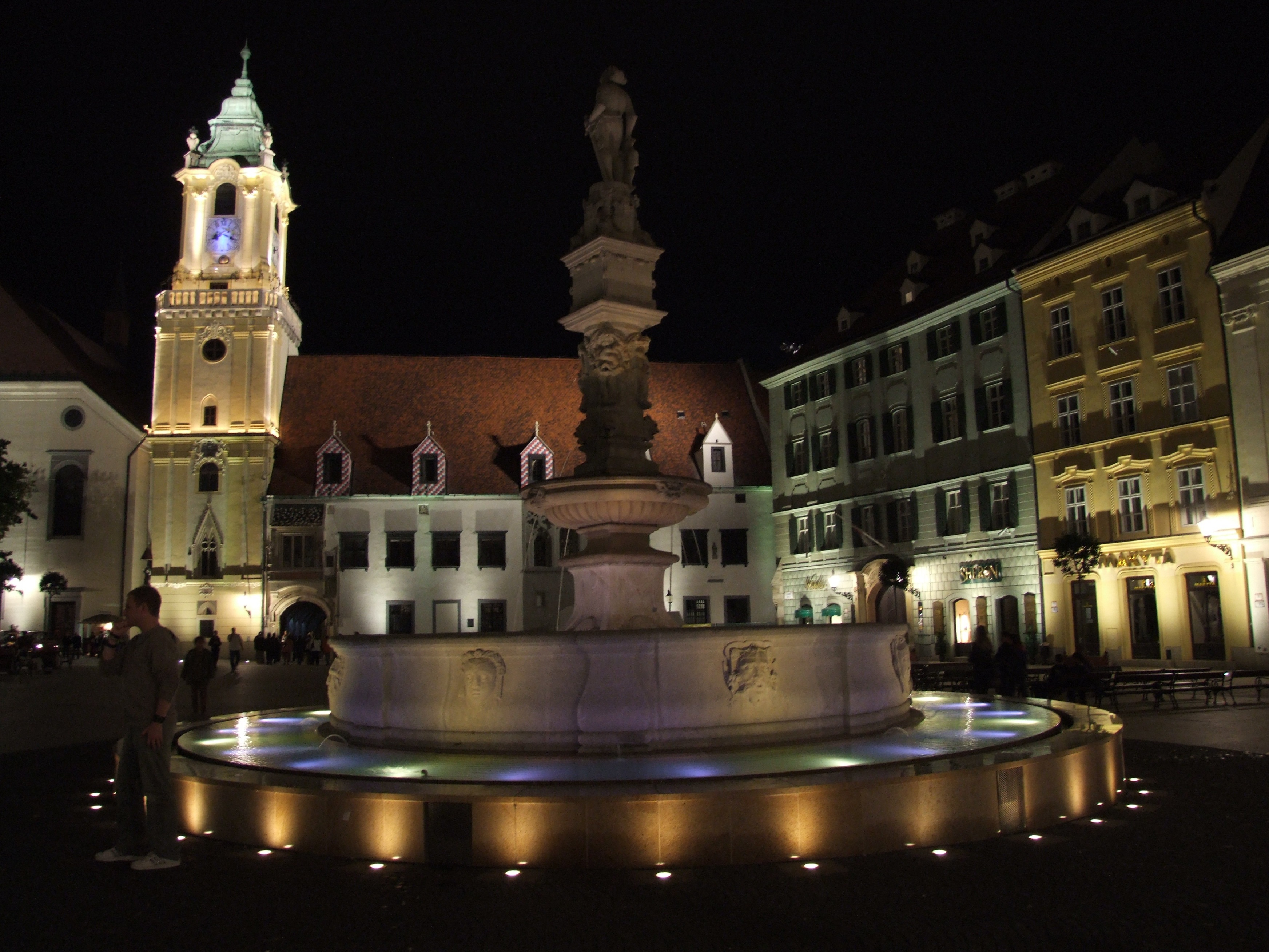 Bratislava, Slovakia at night